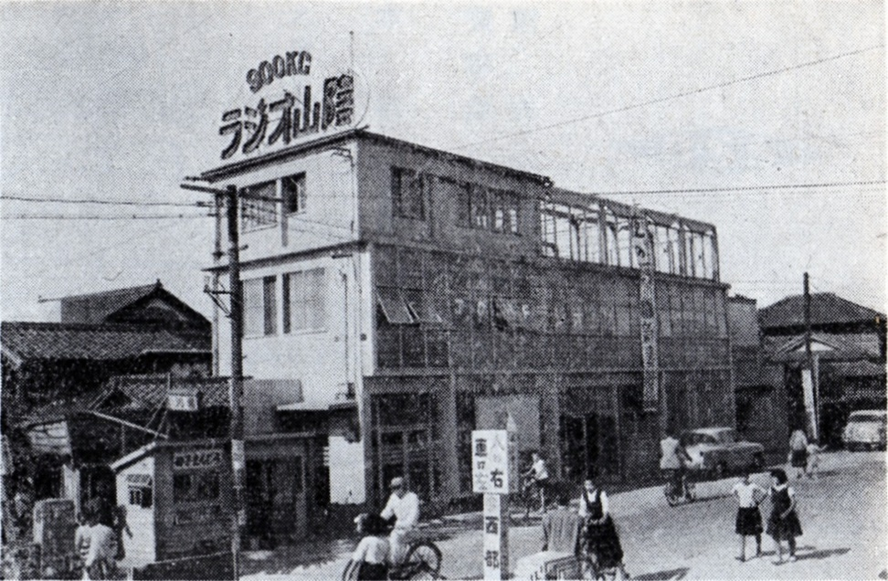 ラジオ山陰（BSS山陰放送）開局時の本社。パチンコ店の2階を間借りしていた。1954年撮影。